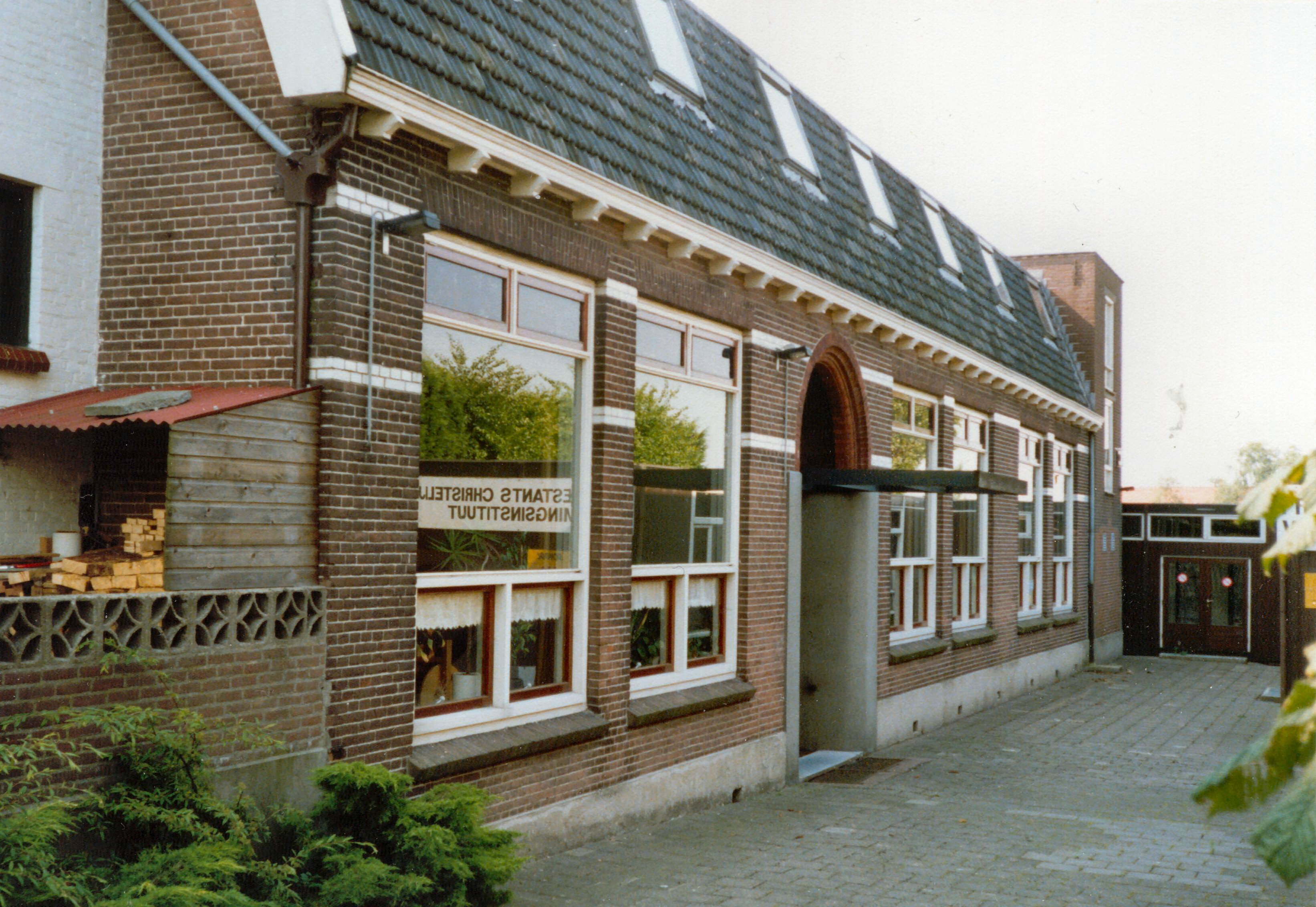 Voormalige Christelijke Lagere School in Rijsoord waar op 15 mei 1940 de capitulatieovereenkomst werd getekend